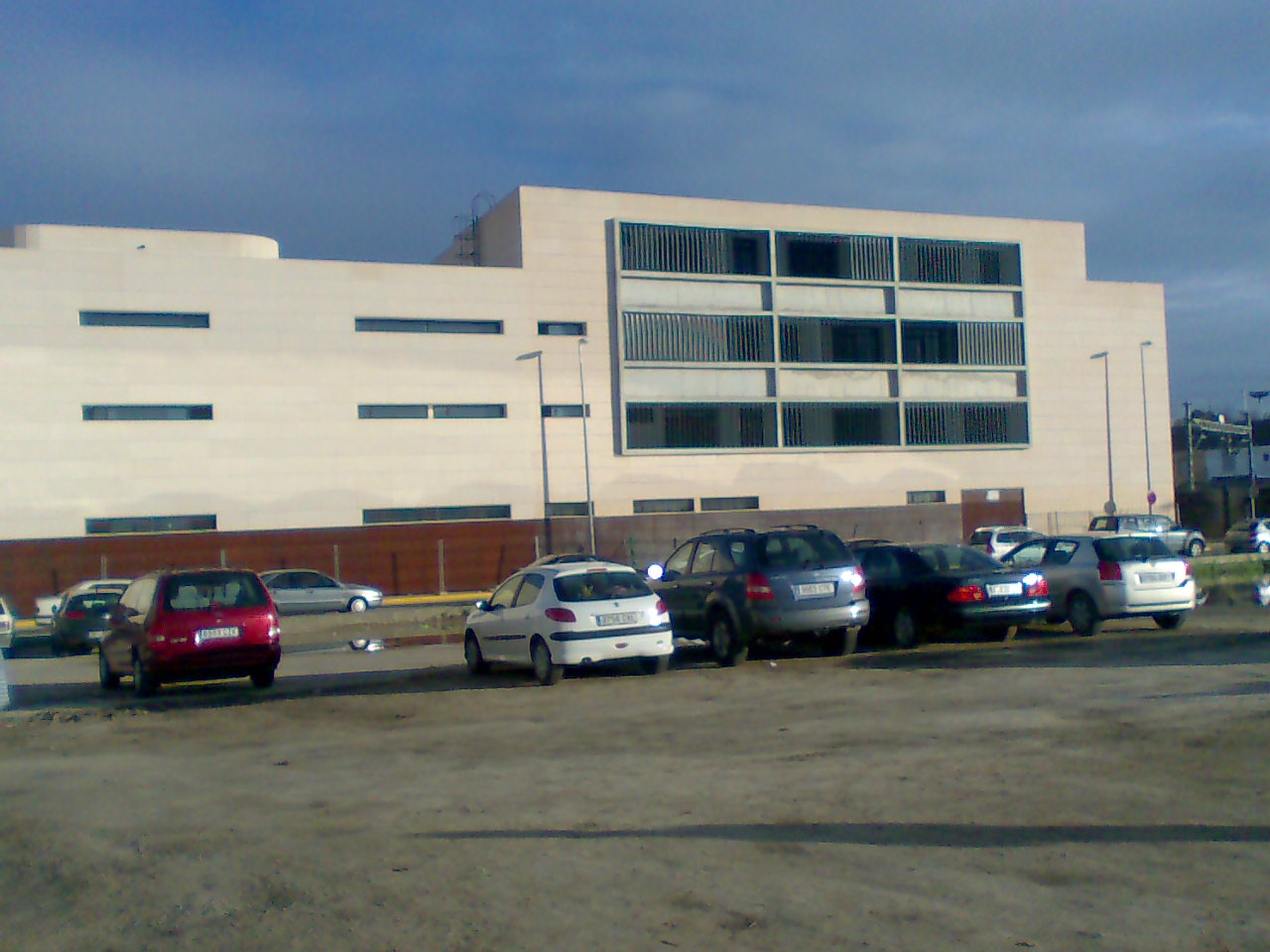 Sede de los juzgados de Dos Hermanas (Sevilla)